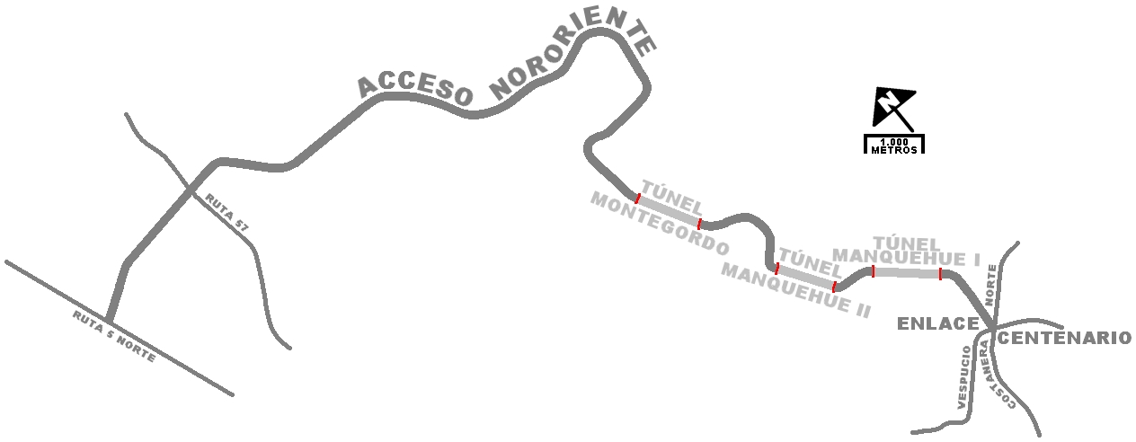 Plano de la Autopista Acceso Nororiente de Santiago de Chile.